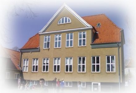 Birkerød Privatskole